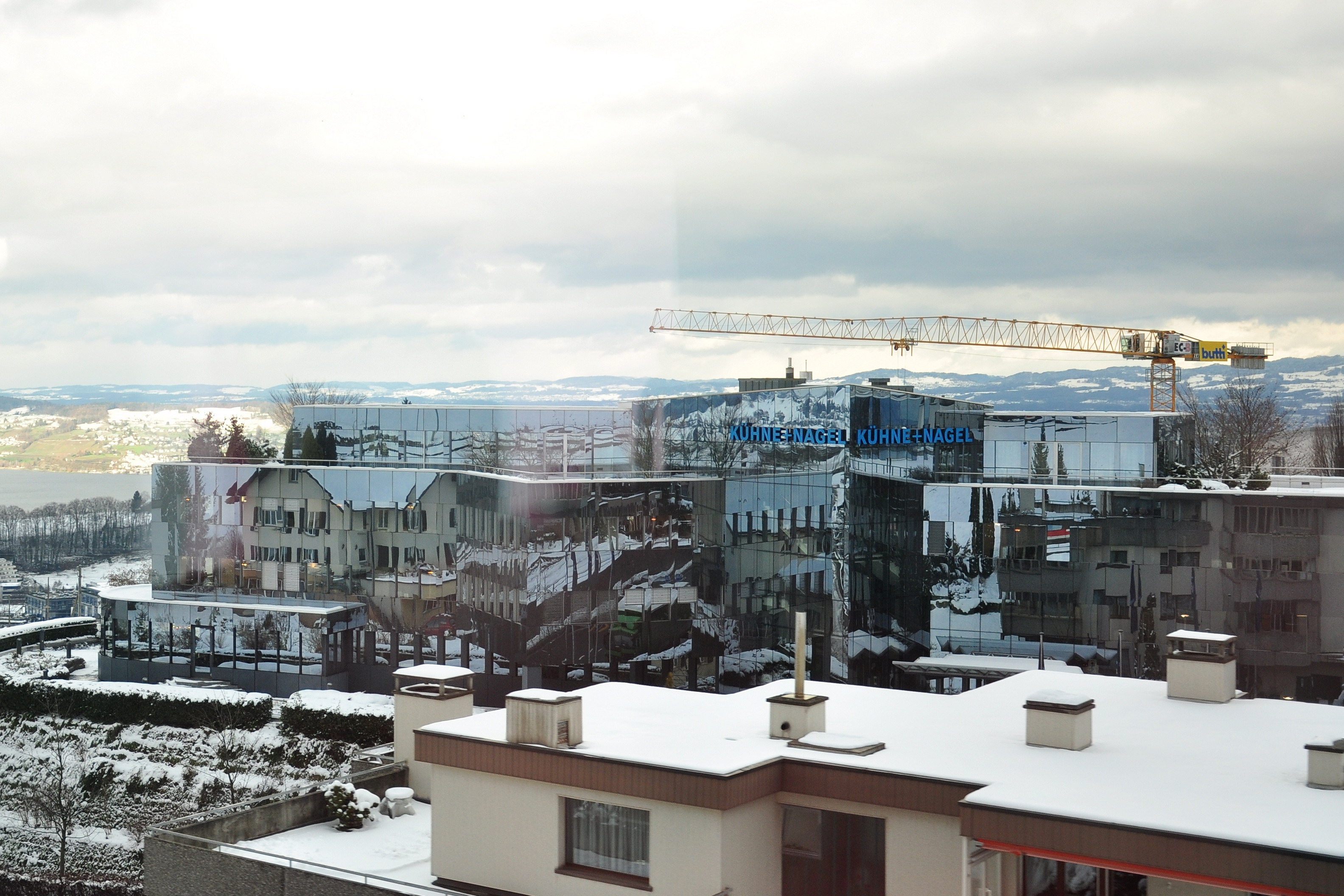 Kühne + Nagel headquarters in Schindellegi (SZ), Switzerland, as seen from S-Bahn Zürich (SOB) line S40